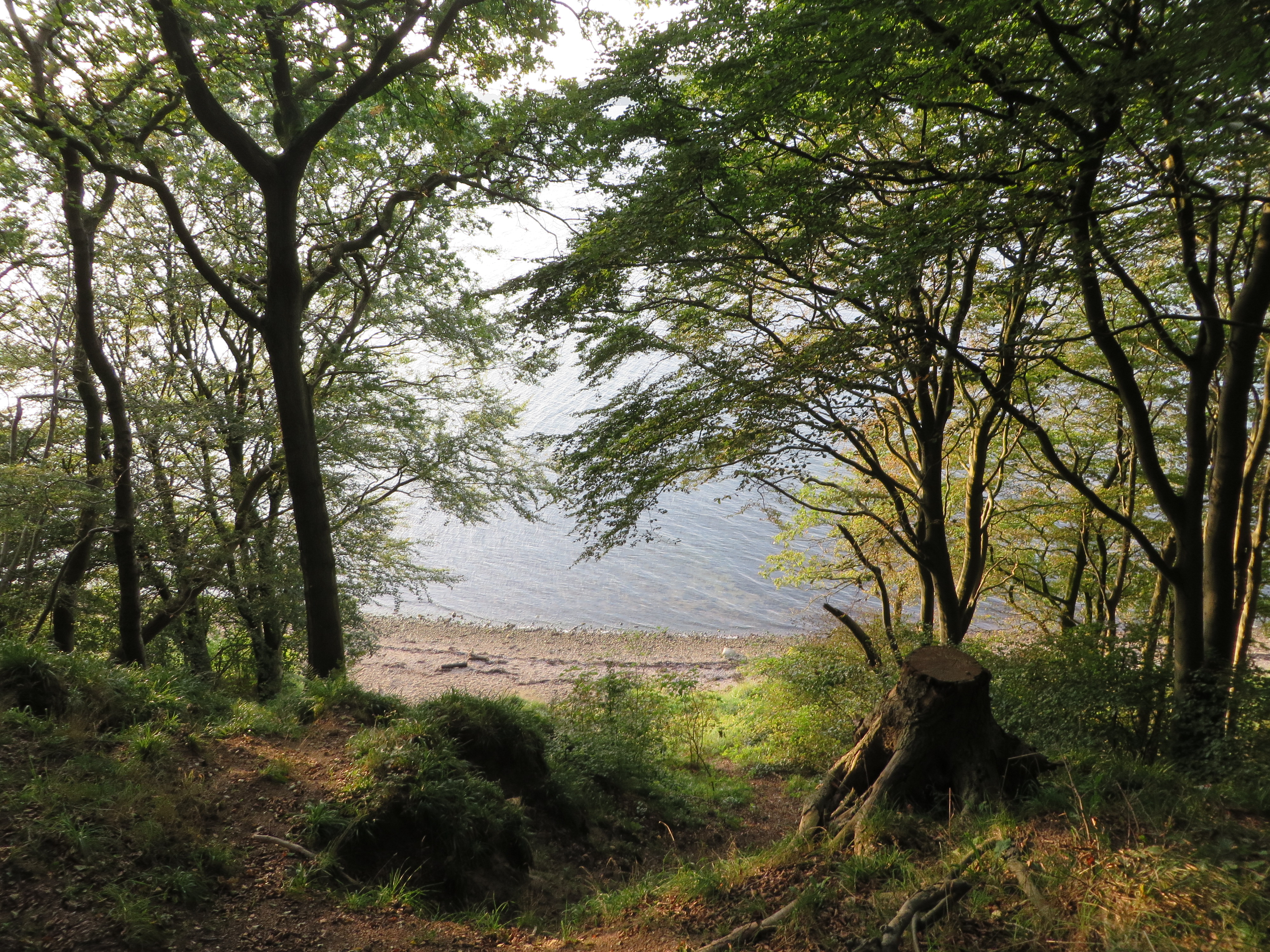 Twedter Mark, Fördehang runter zur Strandkante (Mürwik September 2014), Bild 10